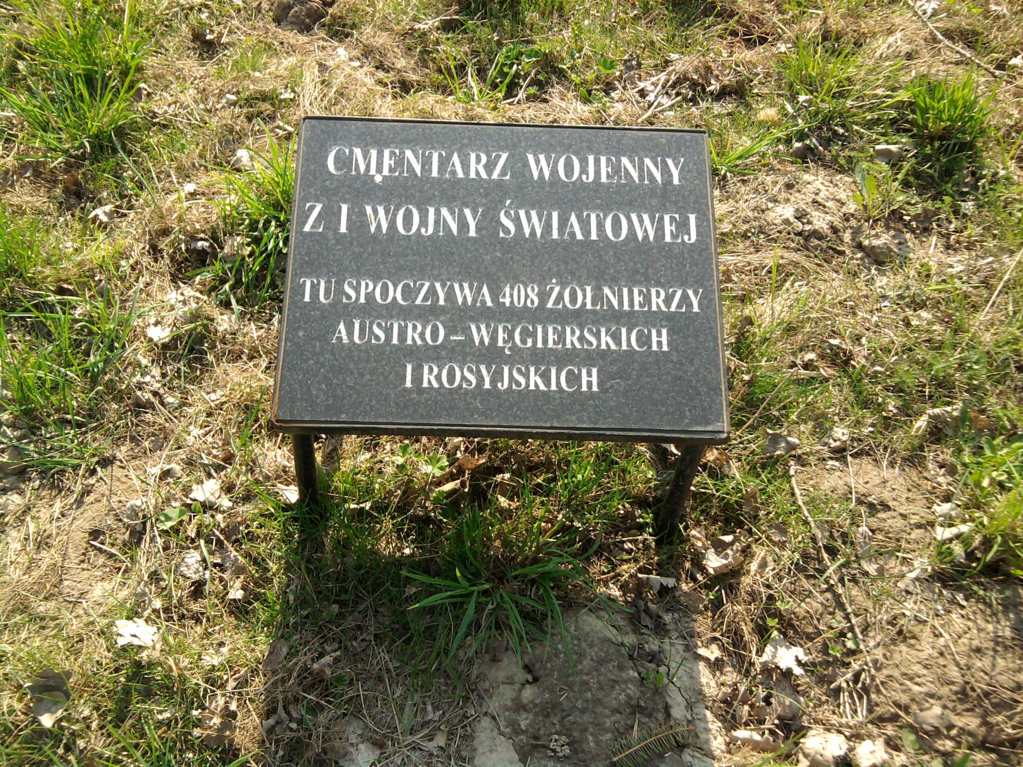 Tablica na zachodnim cmentarzu wojennym z I wojny światowej w Piotrkowie Pierwszym.